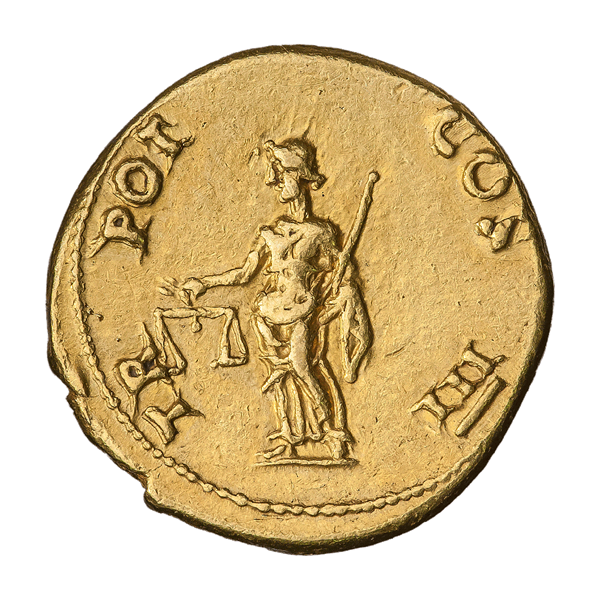 Ауреус. Веспасиан. Ок. 71 г. (реверс). Надпись TR POT COS IIII. Эквита (персонификация справедливости) стоит, влево; в руках весы и скипетр.